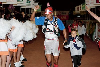 3eme au scratch et 1er Reunionnais du Grand Raid.